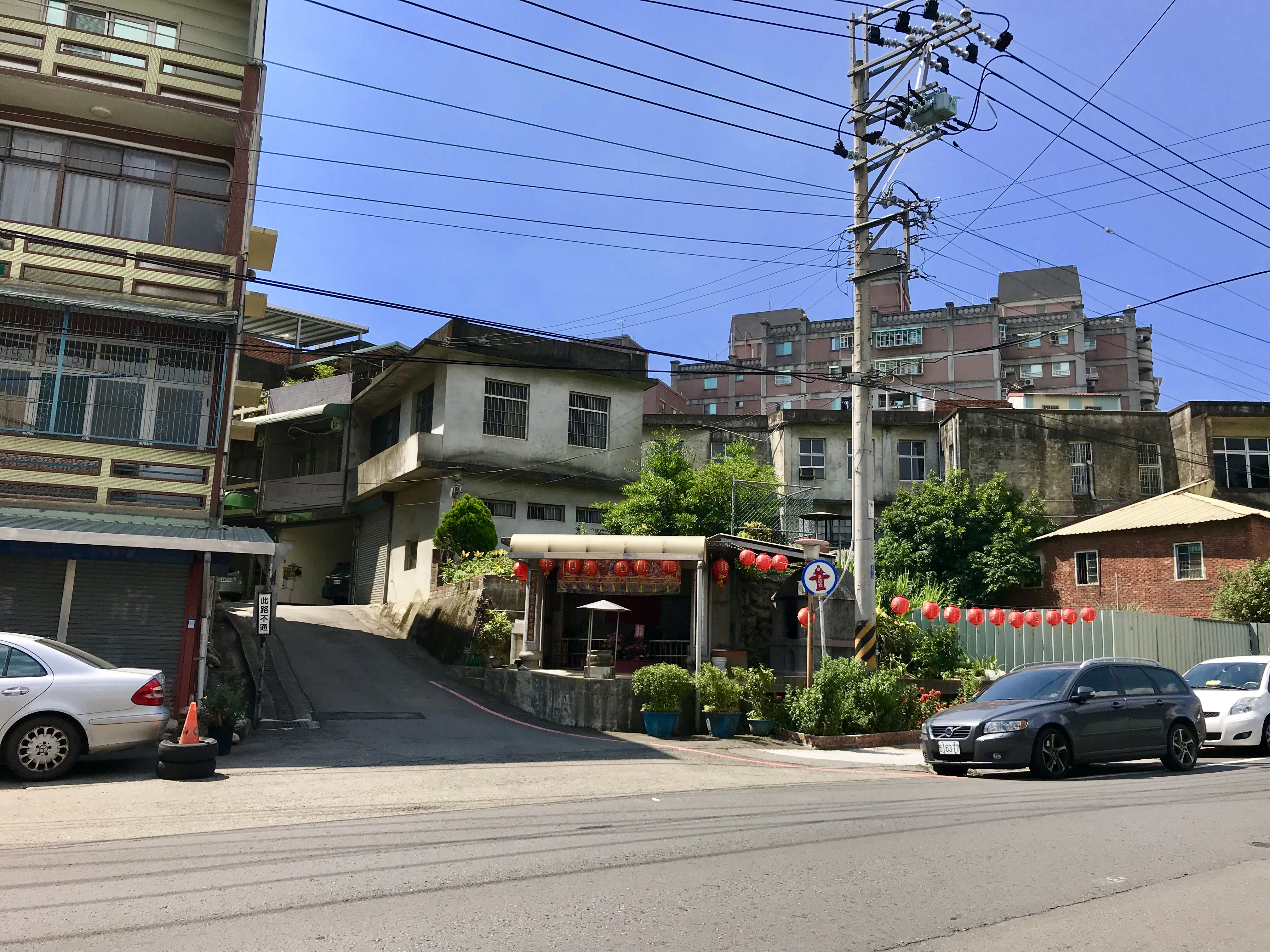 關西石爺亭遠景